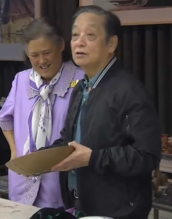 诗琳通公主和韩美林，2018年4月4日。